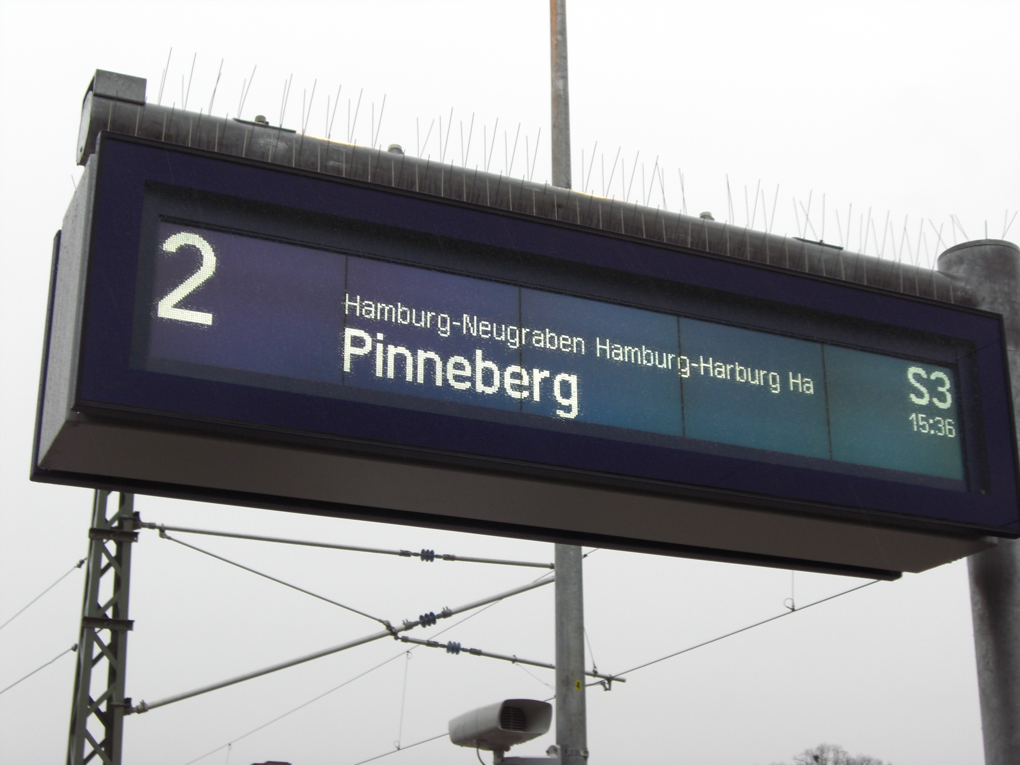 Zugzielanzeiger am Bahnhof Buxtehude.